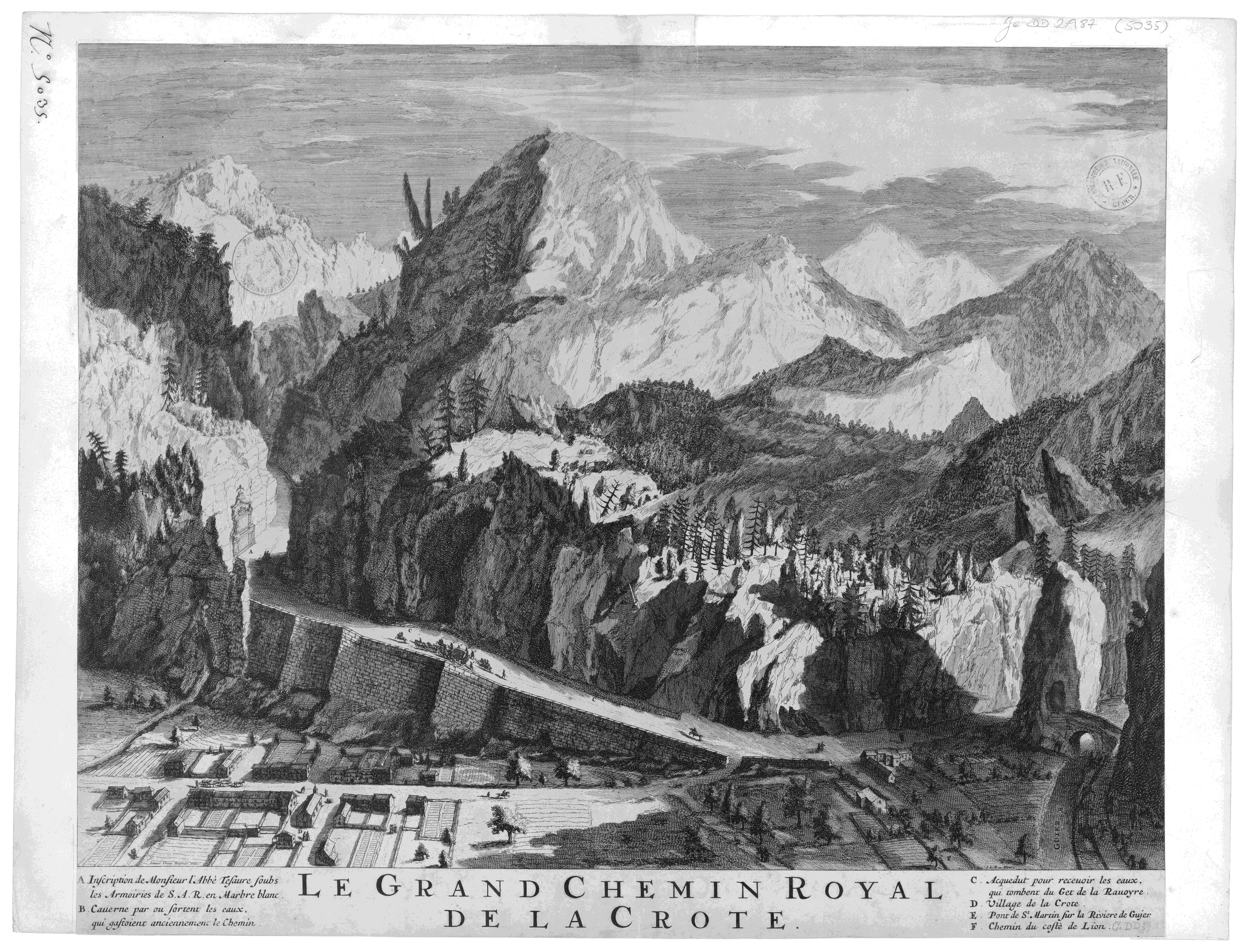 Le grand chemin royal de la Crote.label QS:Lfr,"Le grand chemin royal de la Crote."